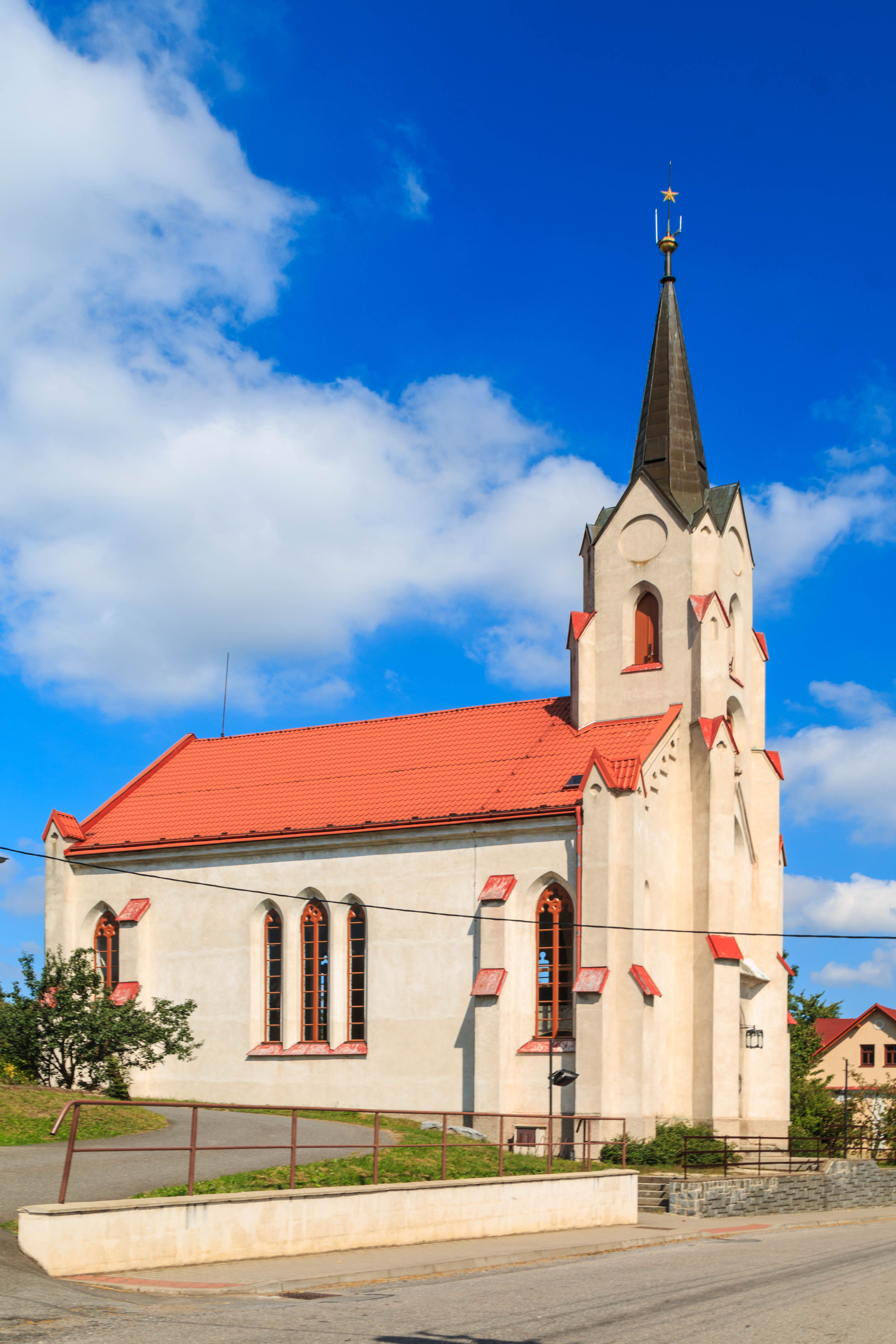 Raná u Hlinska - evangelický kostel